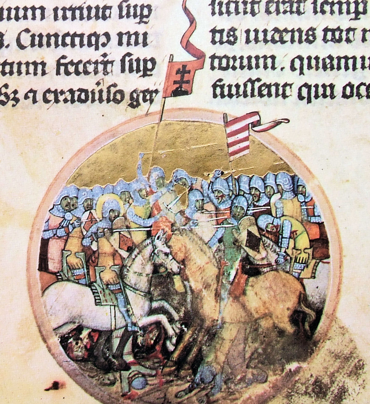 A mogyoródi csata. Miniatúra a Képes Krónikában (1358). Fehér lovon László herceg (Szent László), vele szemben Salamon király